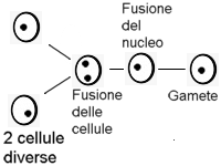 Esplicazione grafica del processo della Gamontogamia